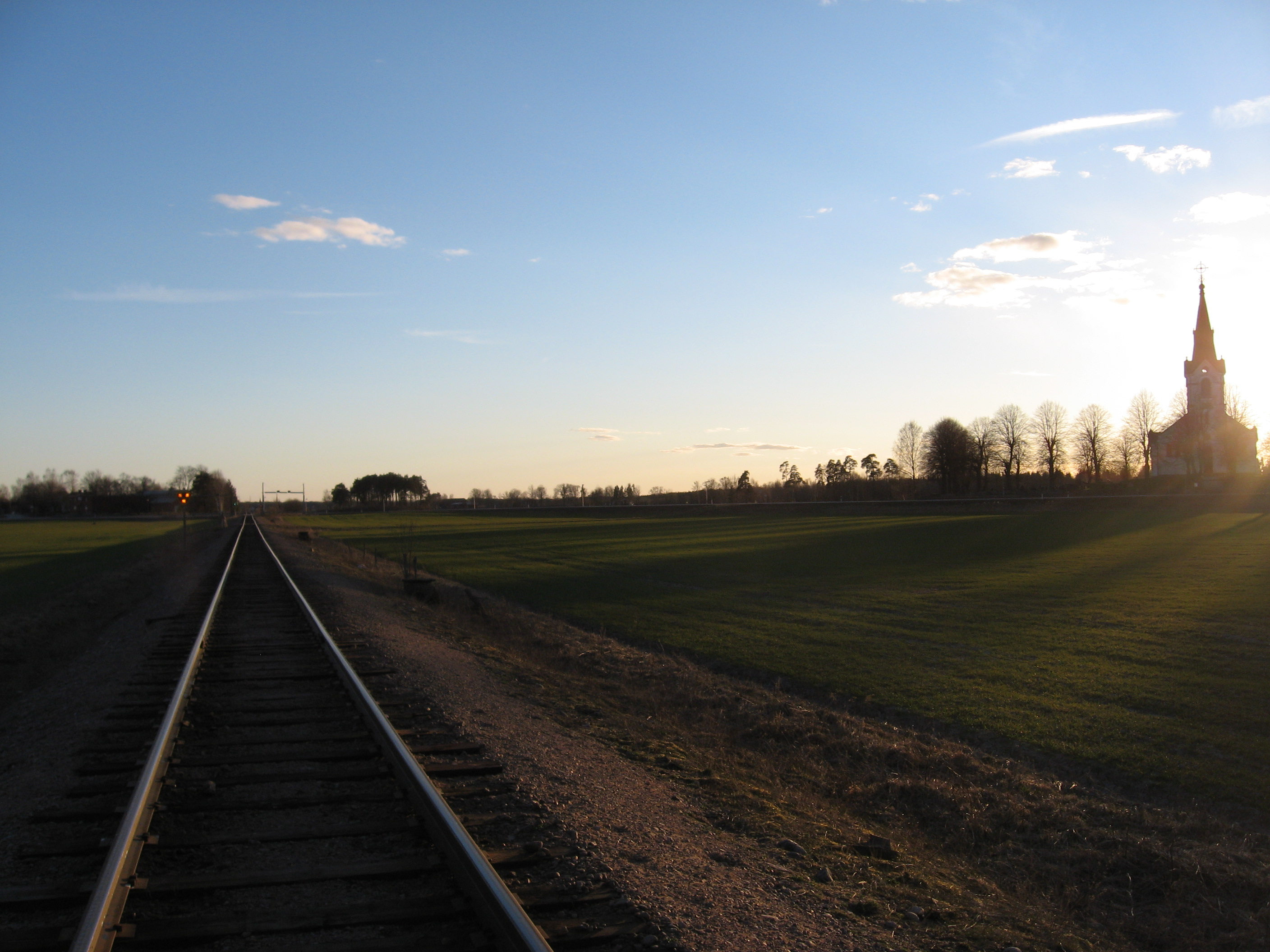 Vy över Hassle